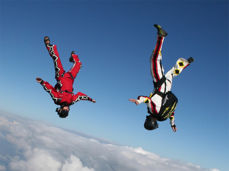 Fallschirmspringer beim Freeflying (Headdown) über Wels, Österreich